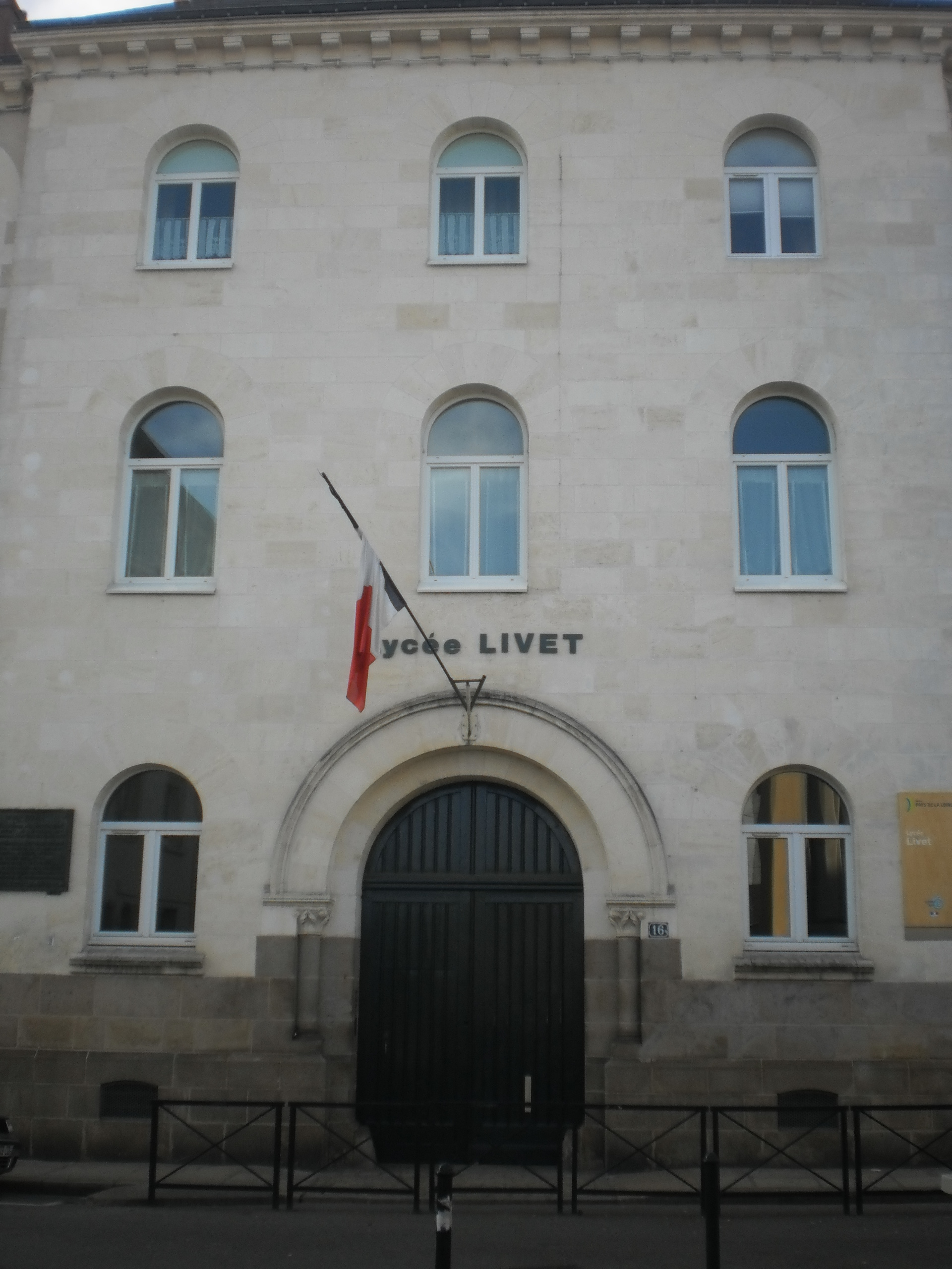 Porte d'entrée du lycée Eugène-Livet (Nantes, France)